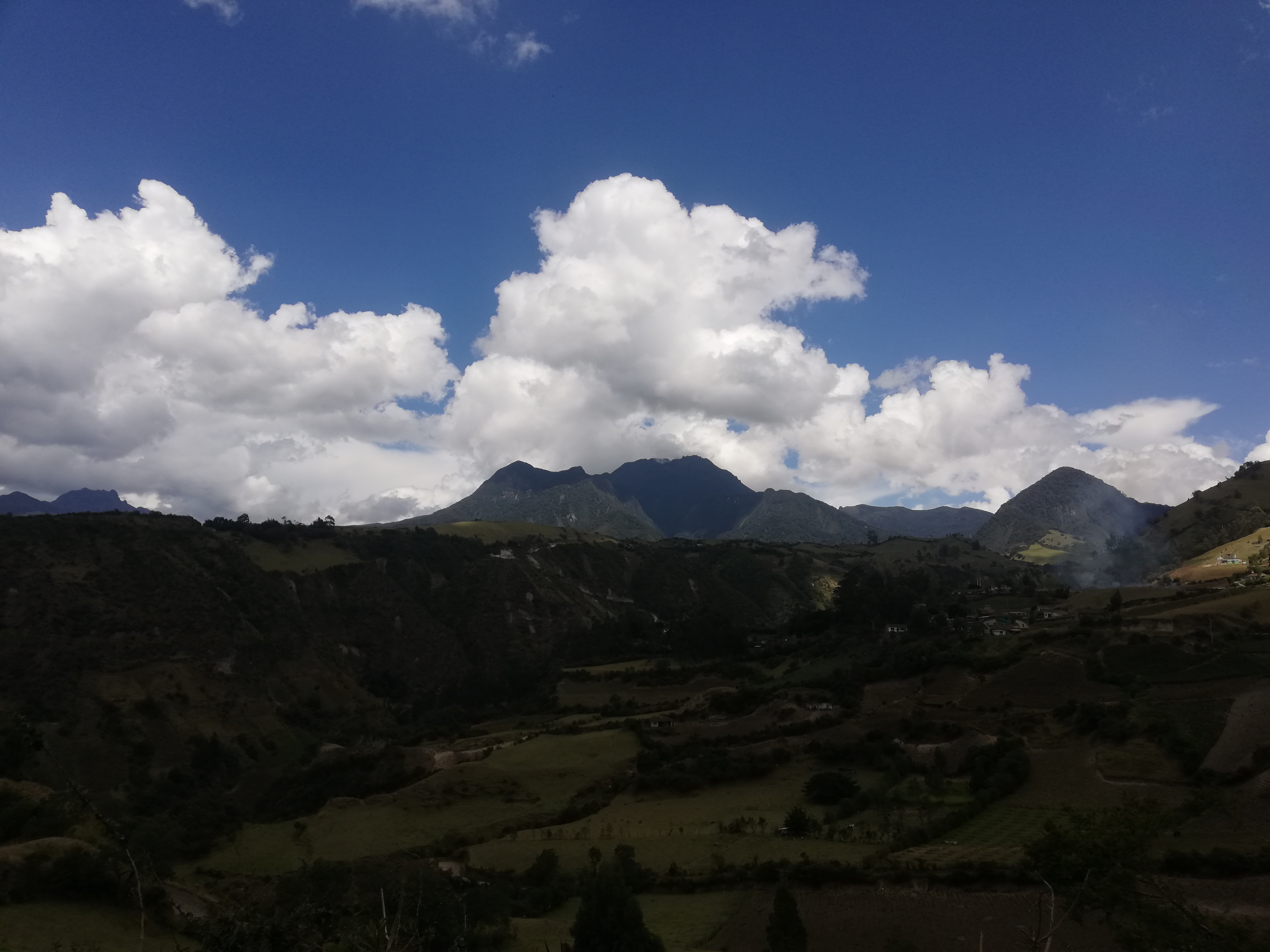 Tomada desde Tajumbina, la Cruz Nariño.